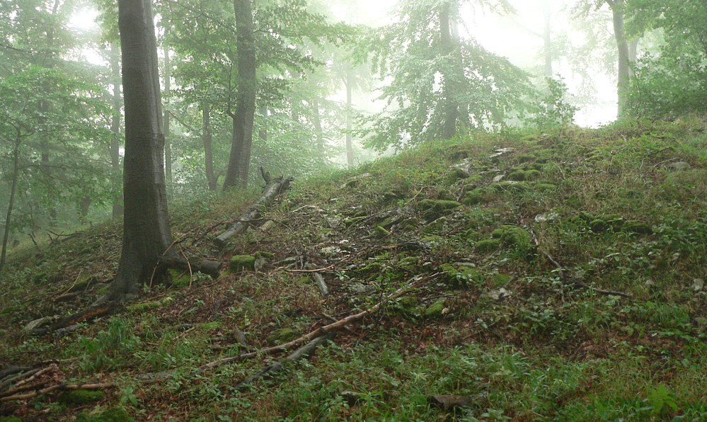 Wall der Barenburg mit Steinresten